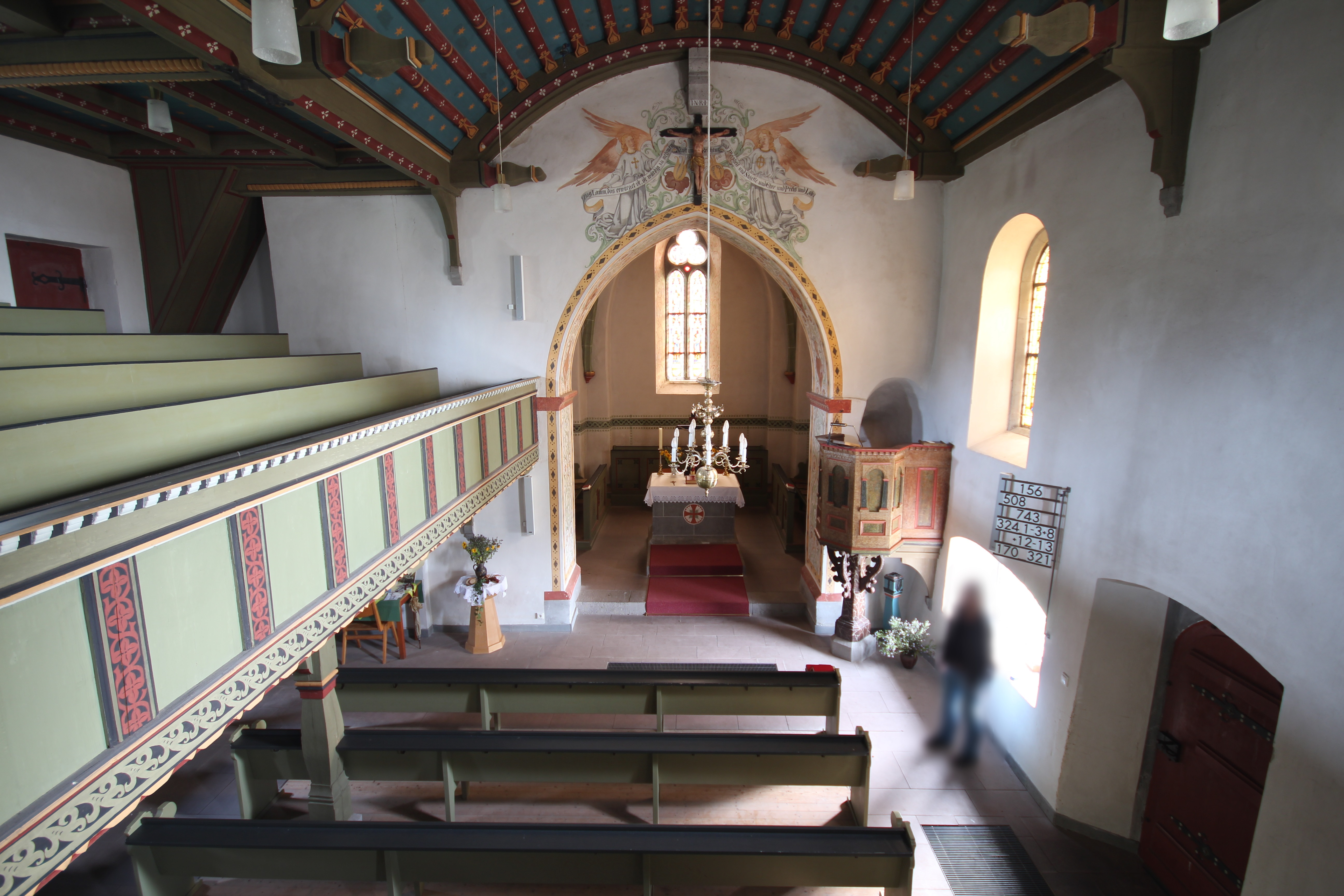 Orgel der Ev. Kirche Winnen, Allendorf/Lumda, Landkreis Gießen, Hessen, Deutschland